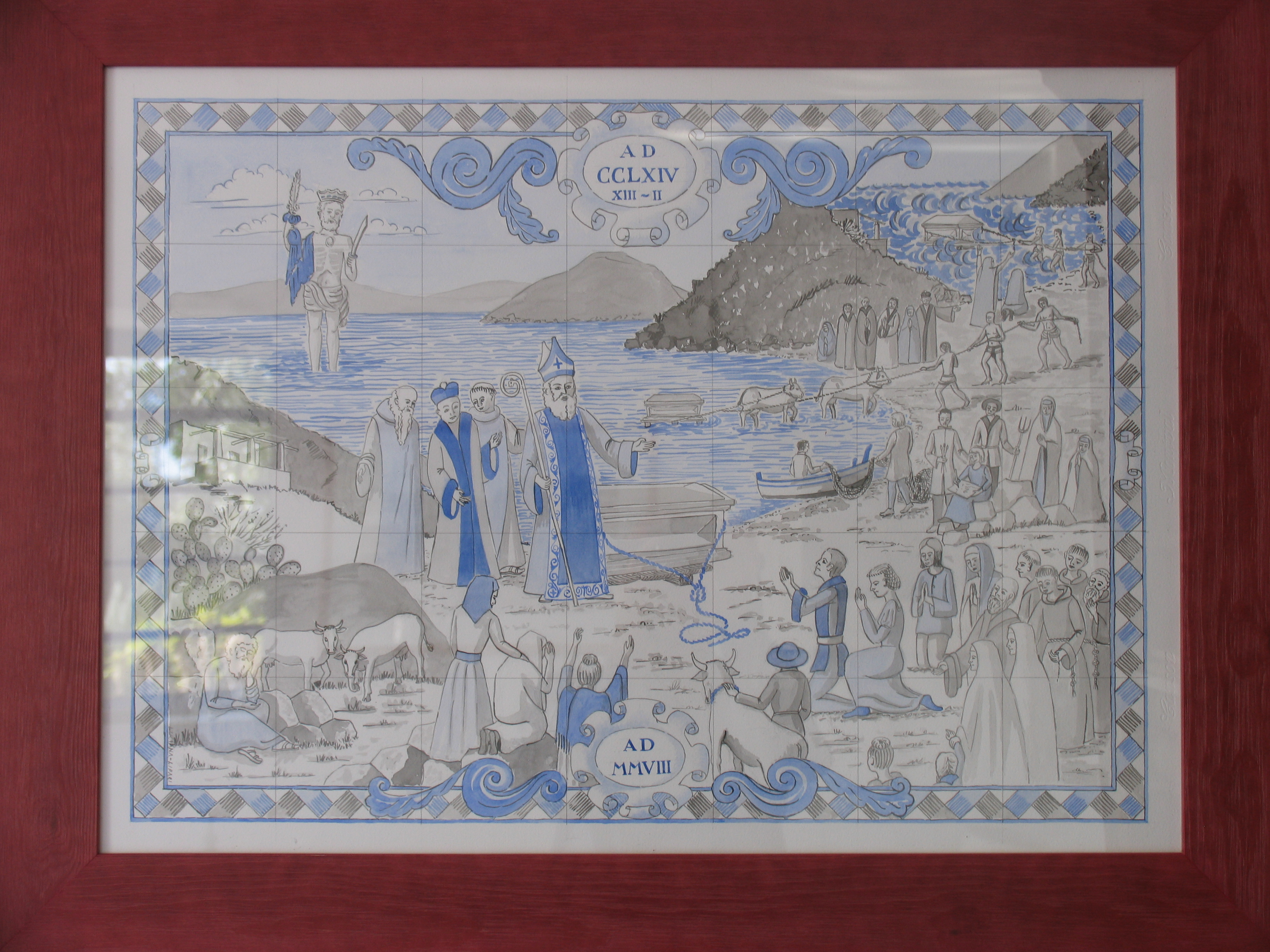 Dipinto di artista locale raffigurante la vera storia di San Bartolo